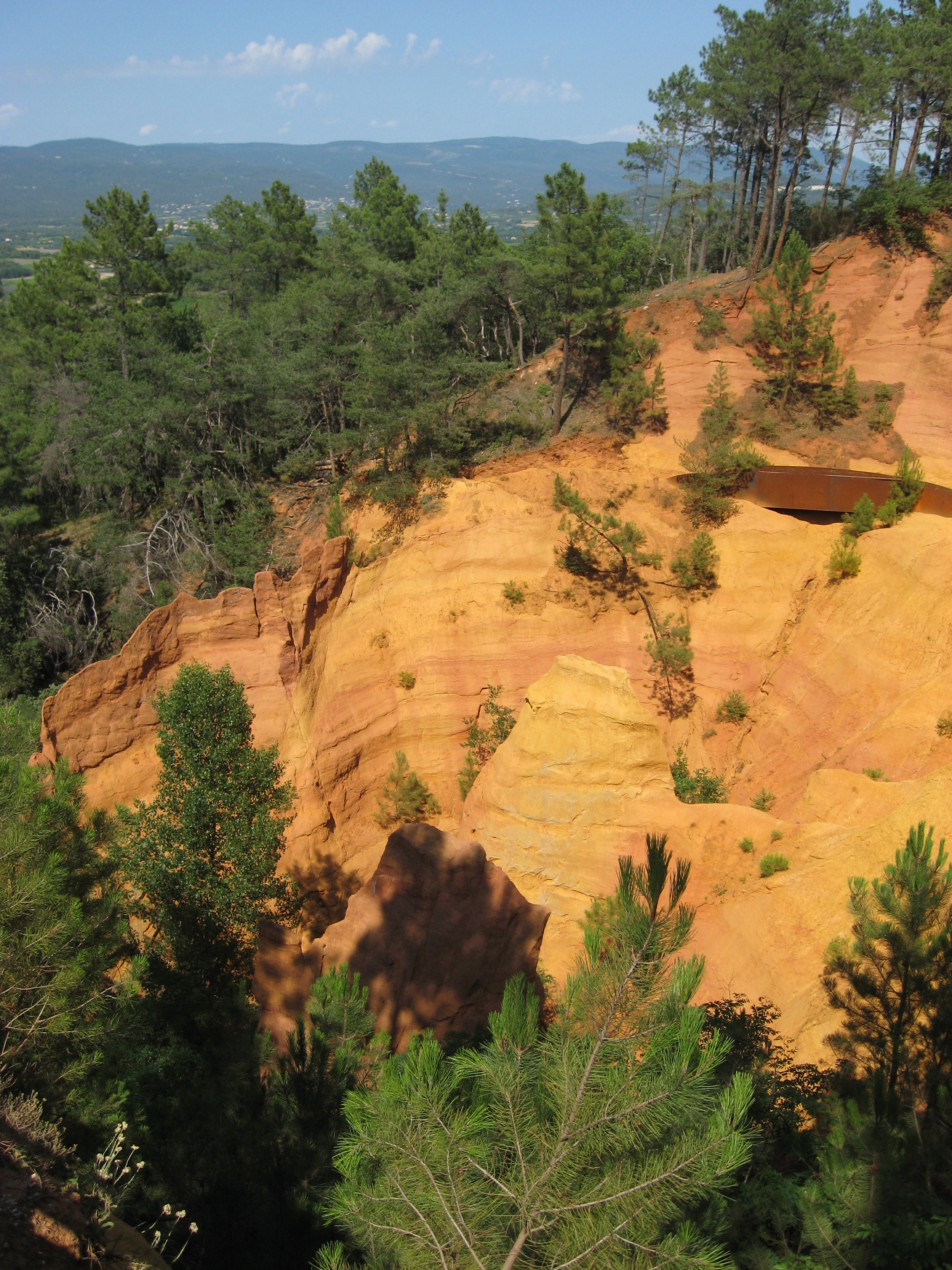 Okergroeve bij Roussillon (Vaucluse)|Rousillon